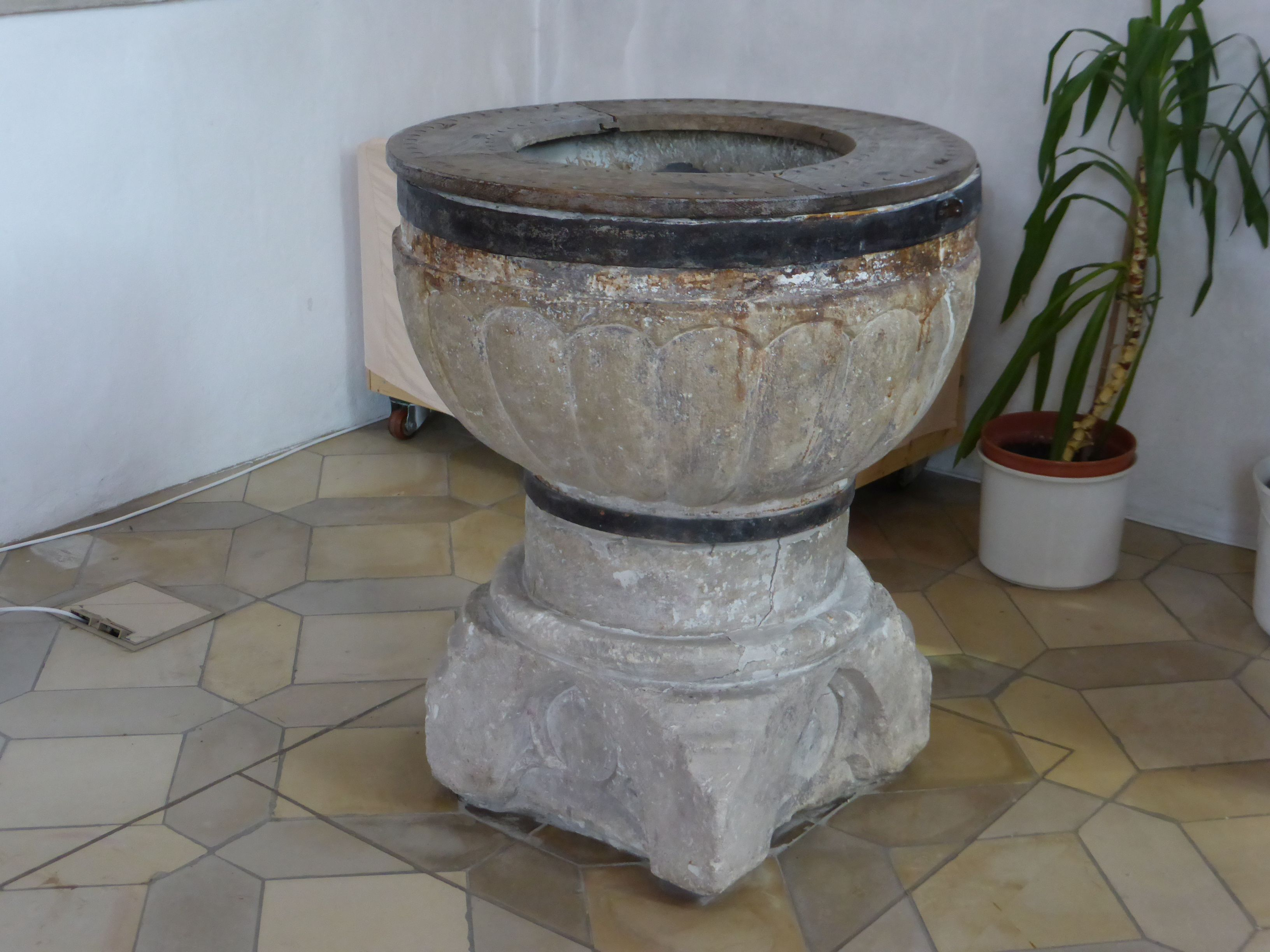 Romanisches Taufbecken in der Pfarrkirche St. Jakobus in Laaber mit gotischem Fuß